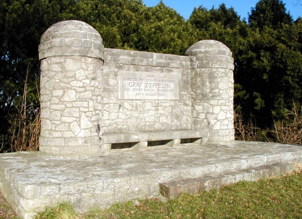 Zeppelinstein Kornsand am Rhein bei Mainz (Rheinkilometer 481)